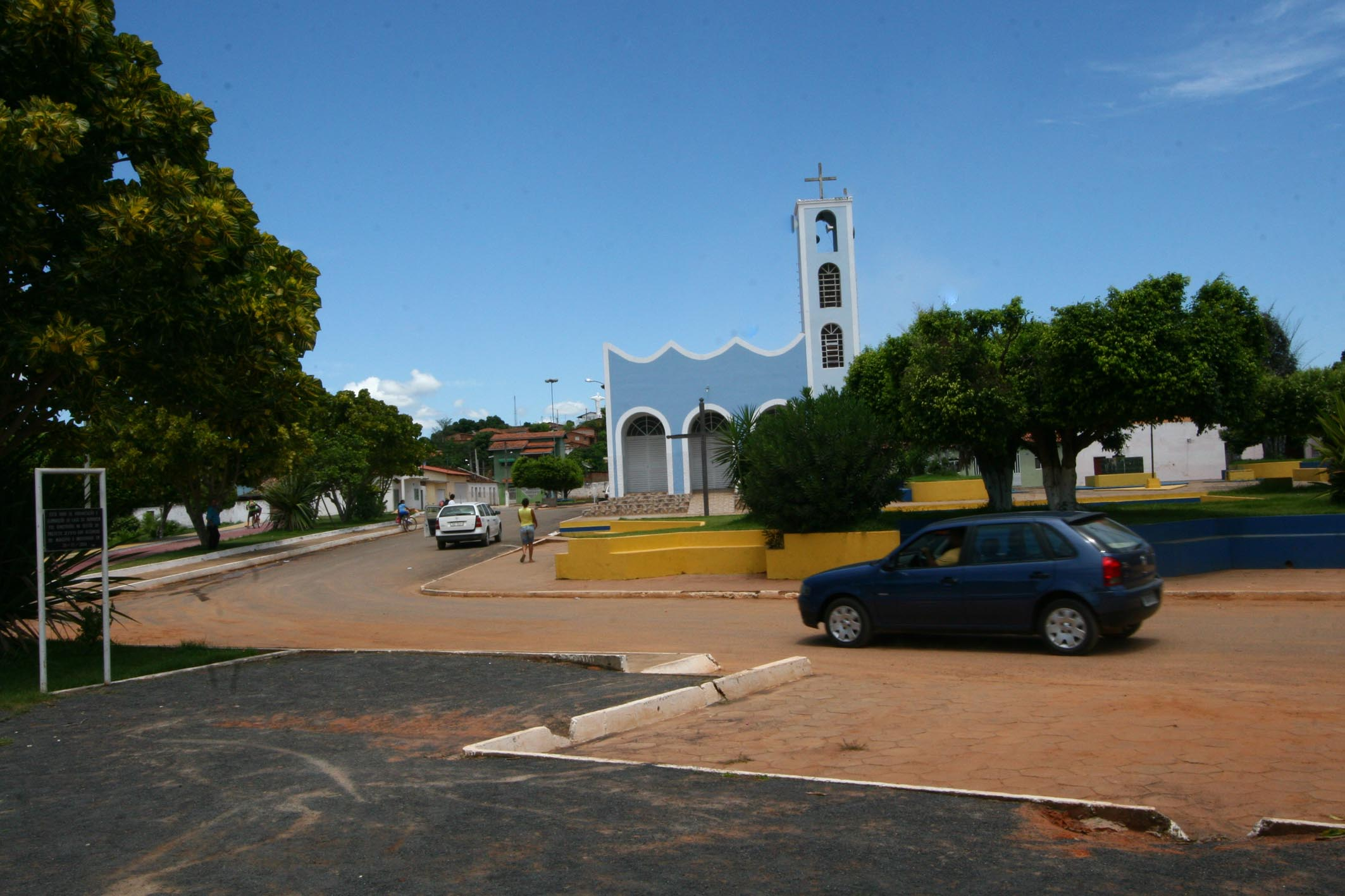 Construção da Ferrovia Oeste-Leste - Na foto: Cidade de São Desidério, que será porta de entrada da Ferrovia na Bahia Foto: Alberto Coutinho/AGECOM